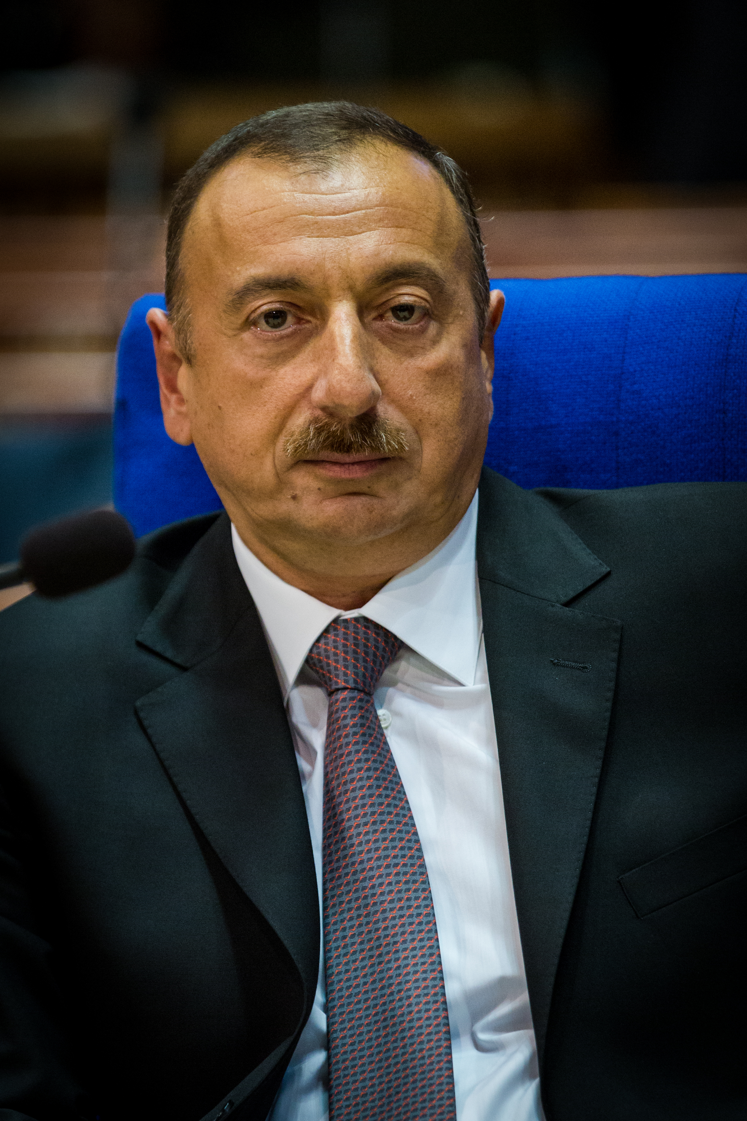 Ilham Aliev, né à Bakou le 24 décembre 1961, est le président de la République d'Azerbaïdjan depuis le 31 octobre 2003.